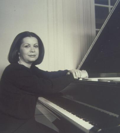 Verda Erman